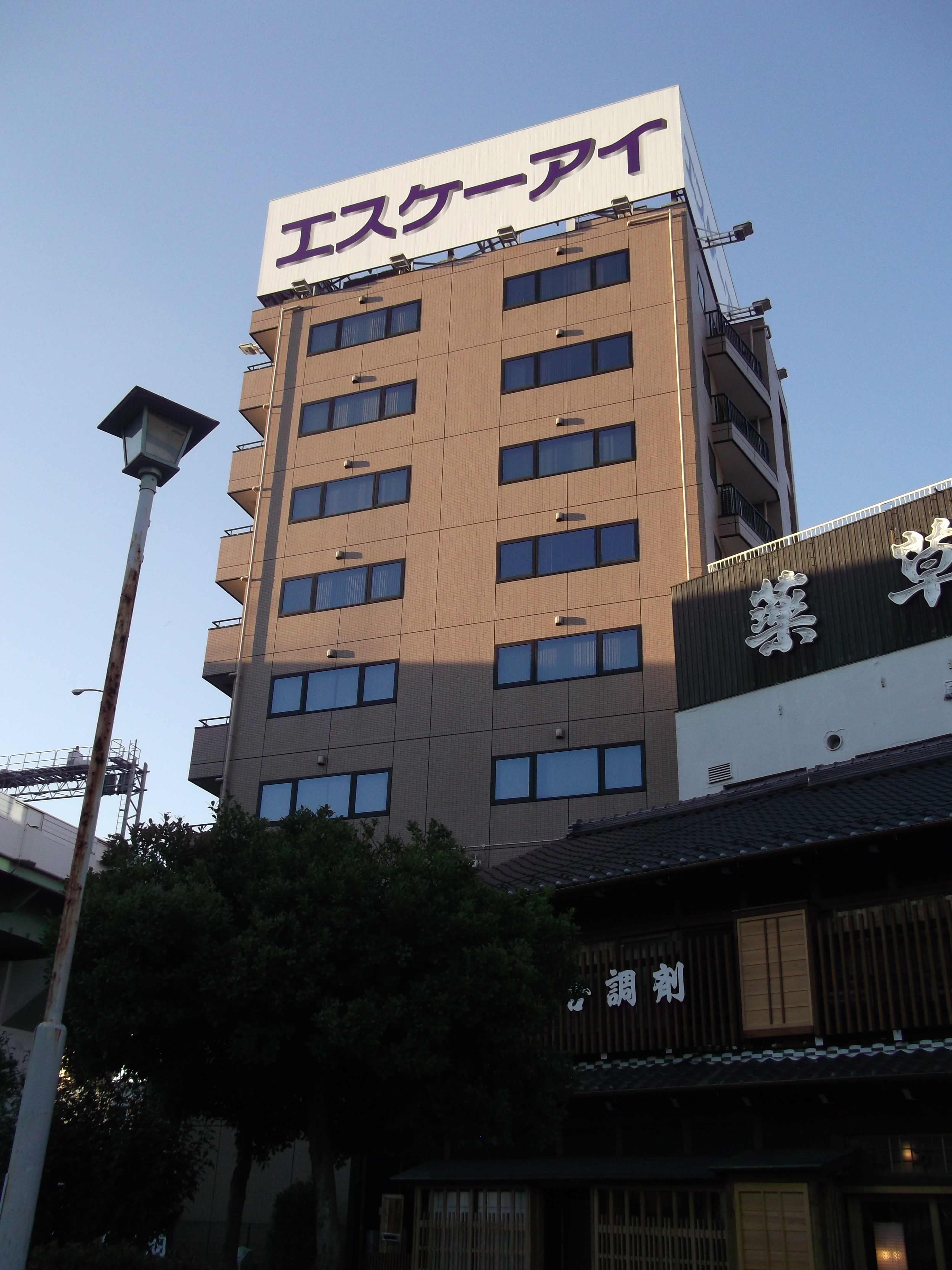 名古屋市中区のエスケーアイ本社を南側より撮影